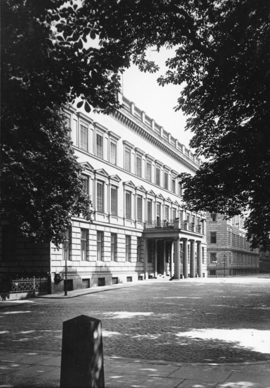 Berlin, preußisches Finanzministerium Berlin Das ehemalige Reichsfinanzministerium [korrekt: preussisches Finanzministerium] - Kastanienwäldchen - [Berlin.- Palais am Festungsgraben, Amtssitz des Preußischen Finanzministeriums]